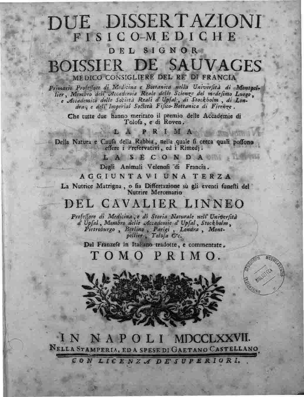 Frontespizio